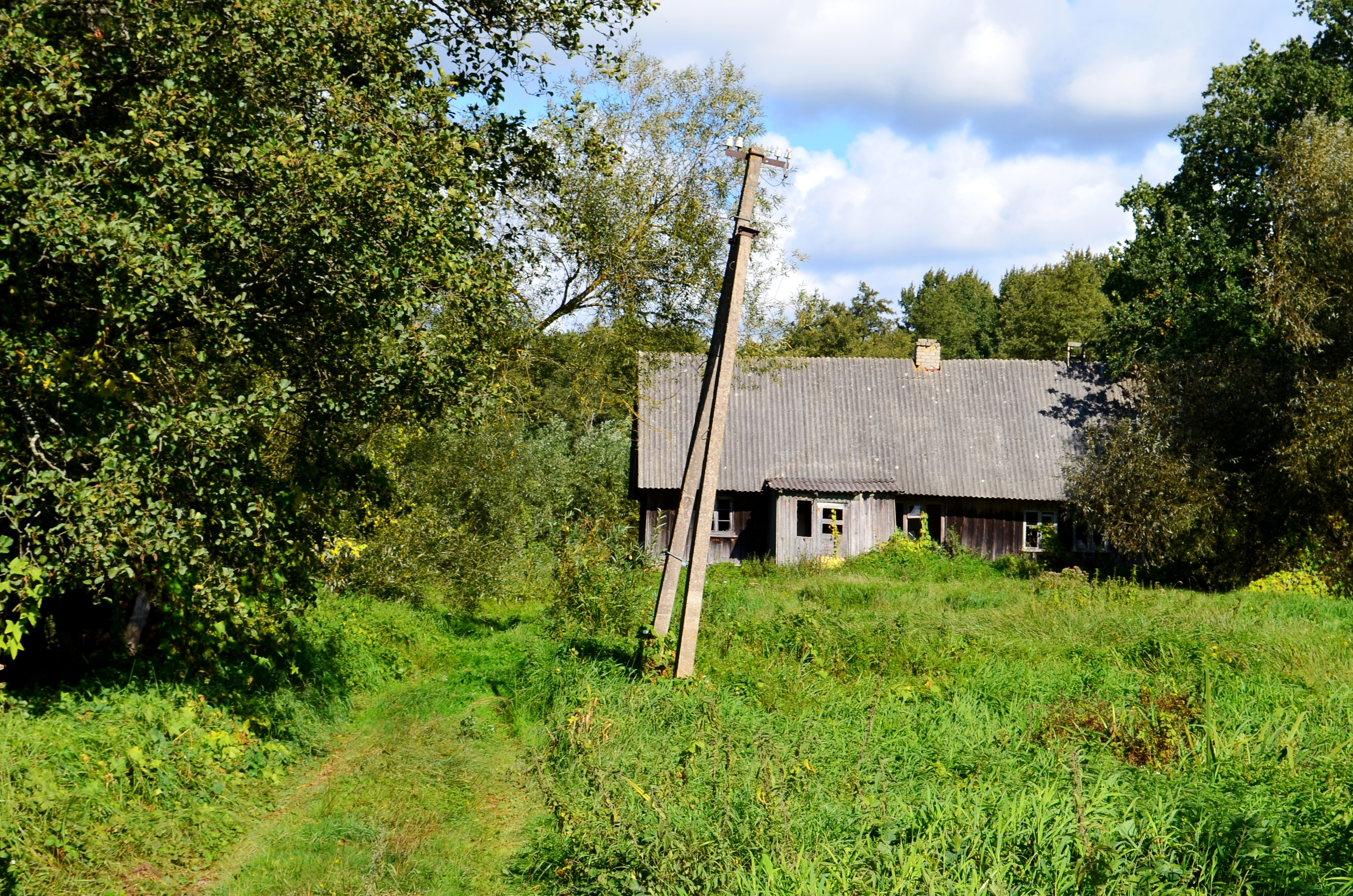 Žemaitėška: Žalgėriu suodas gīvenėms Žalgėrė medie, Šėlotės rajuons